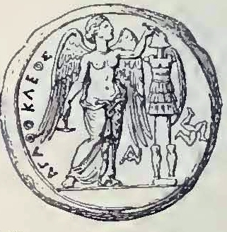 Tetradrachmon des Agathokles (317–289). Vorderseite: Korakopf. Rückseite: Nike nagelt einen Helm an ein Tropaion.